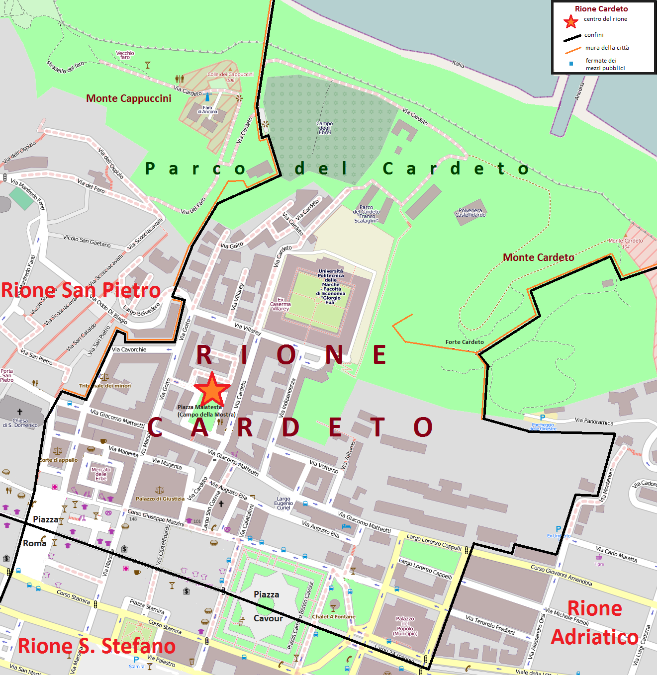 Mappa del Rione Cardeto di Ancona, con i confini, le vie, le piazze e i parchi.